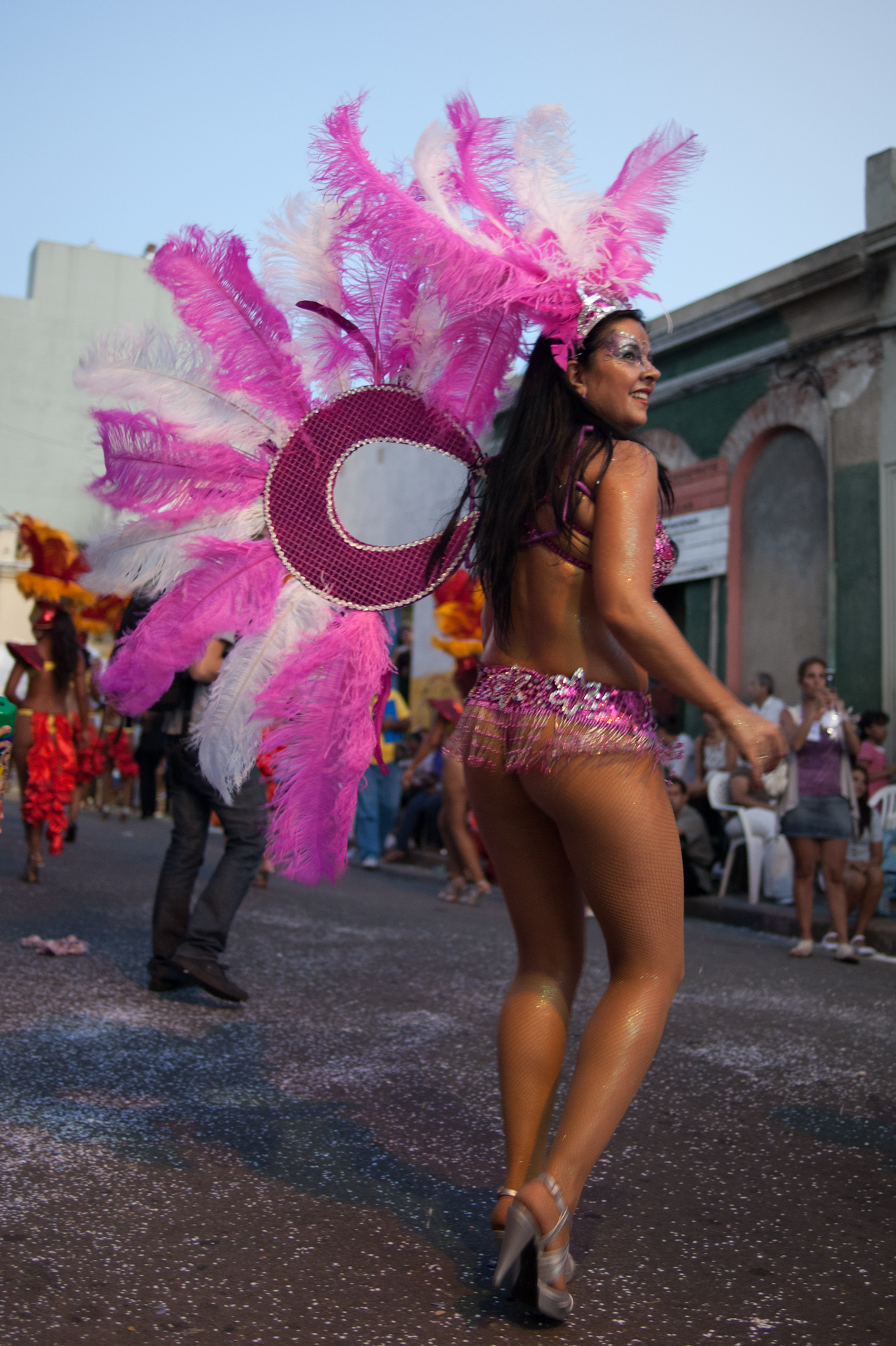 Desfile de Llamadas - Montevideo, Uruguay - February 2011 Las LLamadas, Barrio Sur y Palermo, Montevideo, Uruguay. Camera: Canon EOS 5D Mark II Lens: Zeiss Distagon T* 2/28 ZE 0 ISO: 640